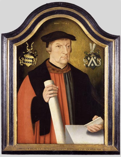 Peter von Heymbach († 1557) sechsmal Kölner Bürgermeister und Kölner Ratsherr in der Zeit von 1521 bis 1556